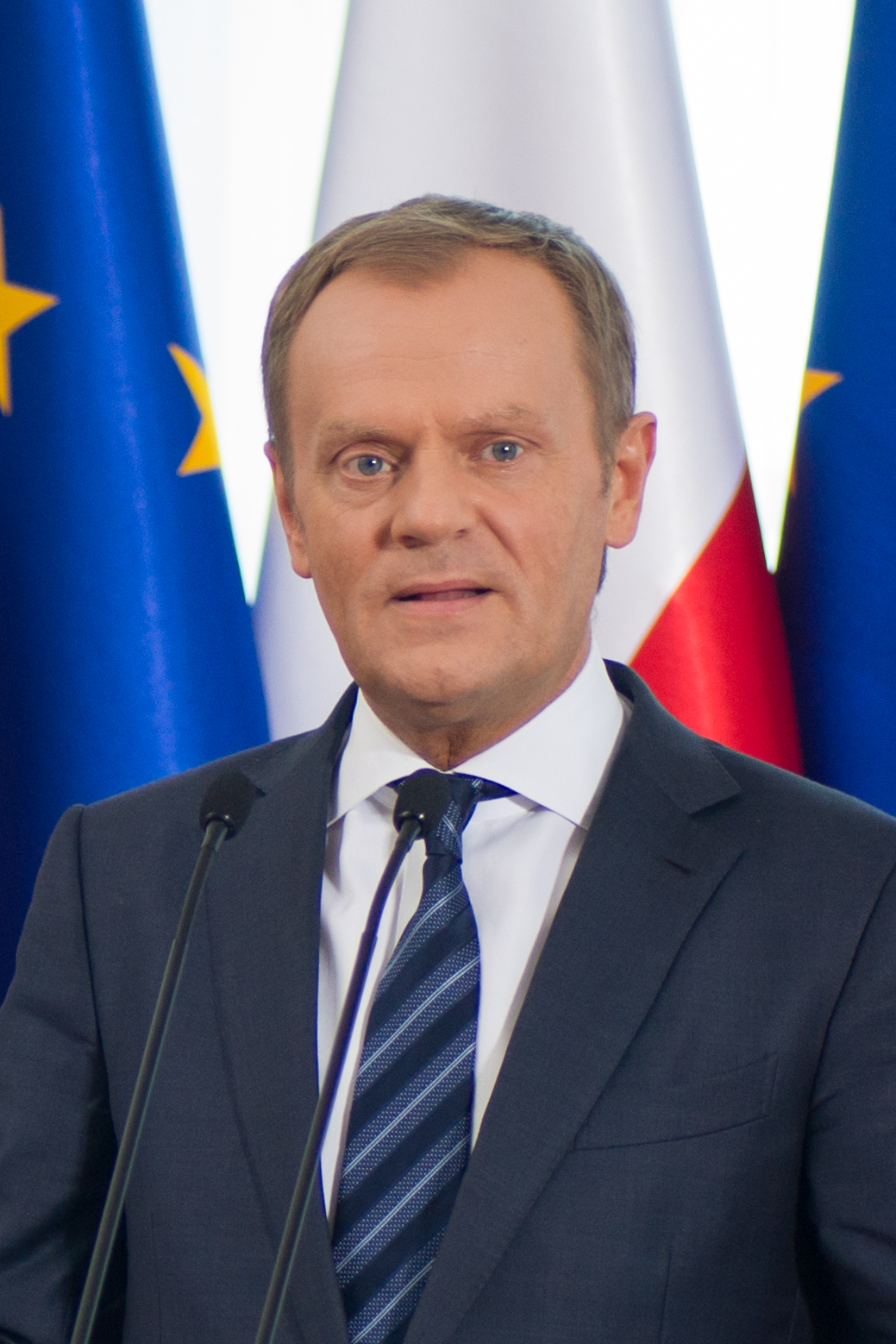 Donald Tusk, 2014, Kancelaria Prezesa Rady Ministrów, Warszawa